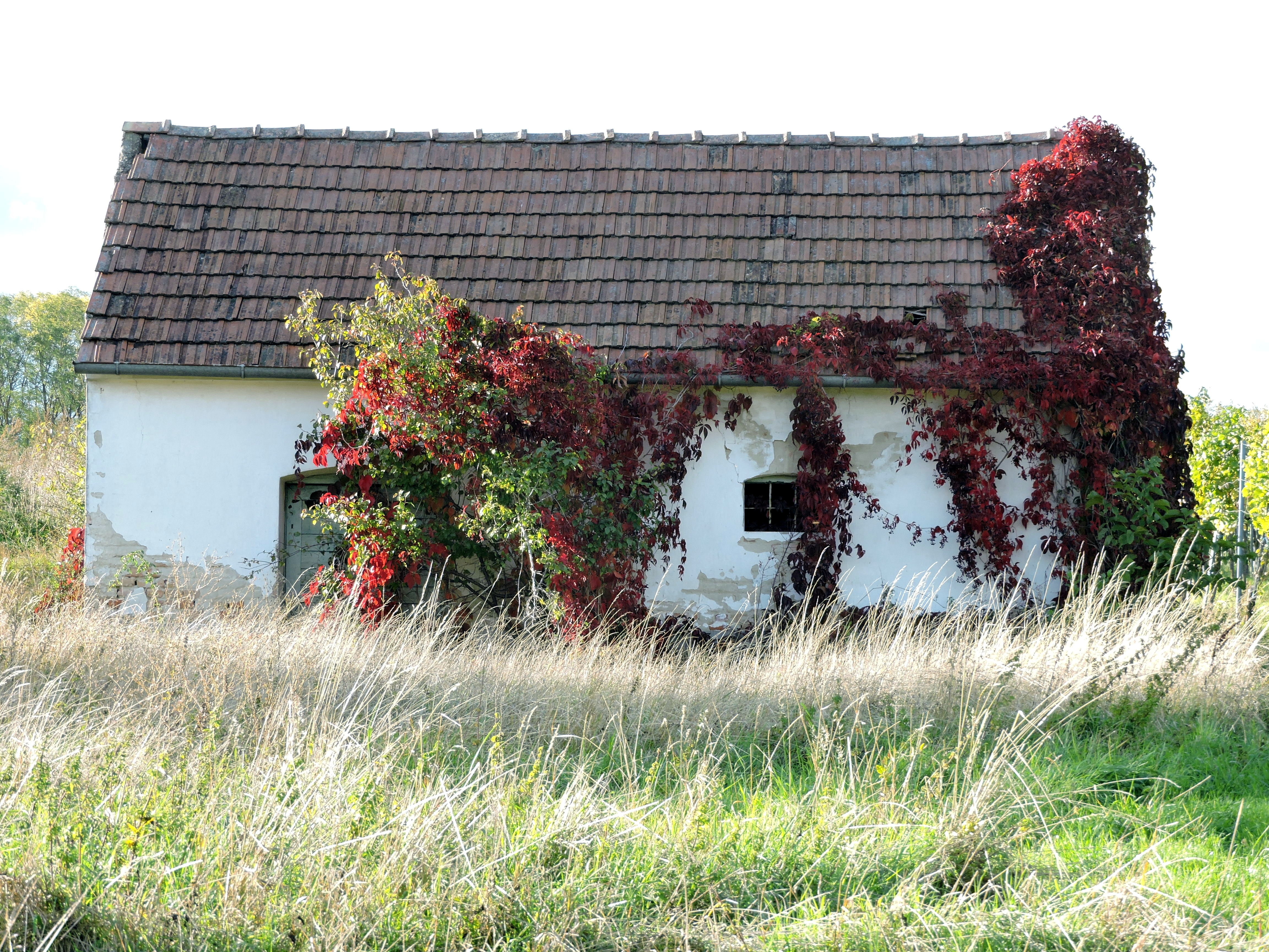 Kellergasse Lüßweg in der KG Niederkreuzstetten in Kreuzstetten Alleinstehender Einzelkeller, etwas zurückversetzt